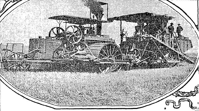 Skurtreskjar: Slepetreskar dregen av ein damptraktor i California.